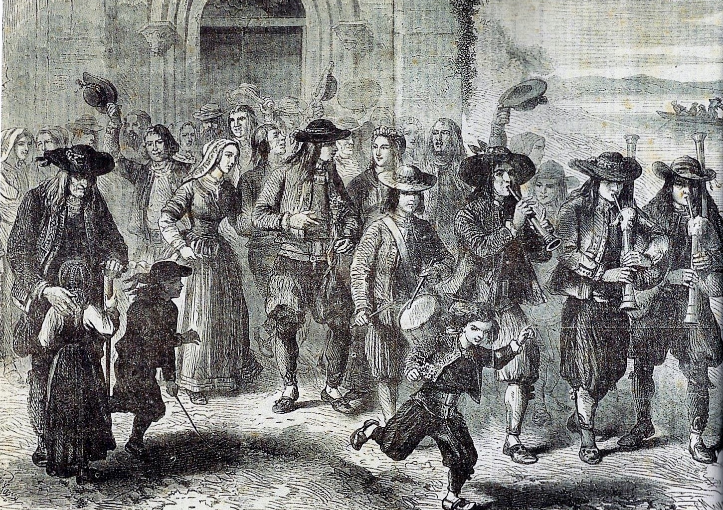 Un mariage à Tréguennec (Finistère) : la sortie des mariés de l'église avec les sonneurs de biniou, bombarde et un tambour.